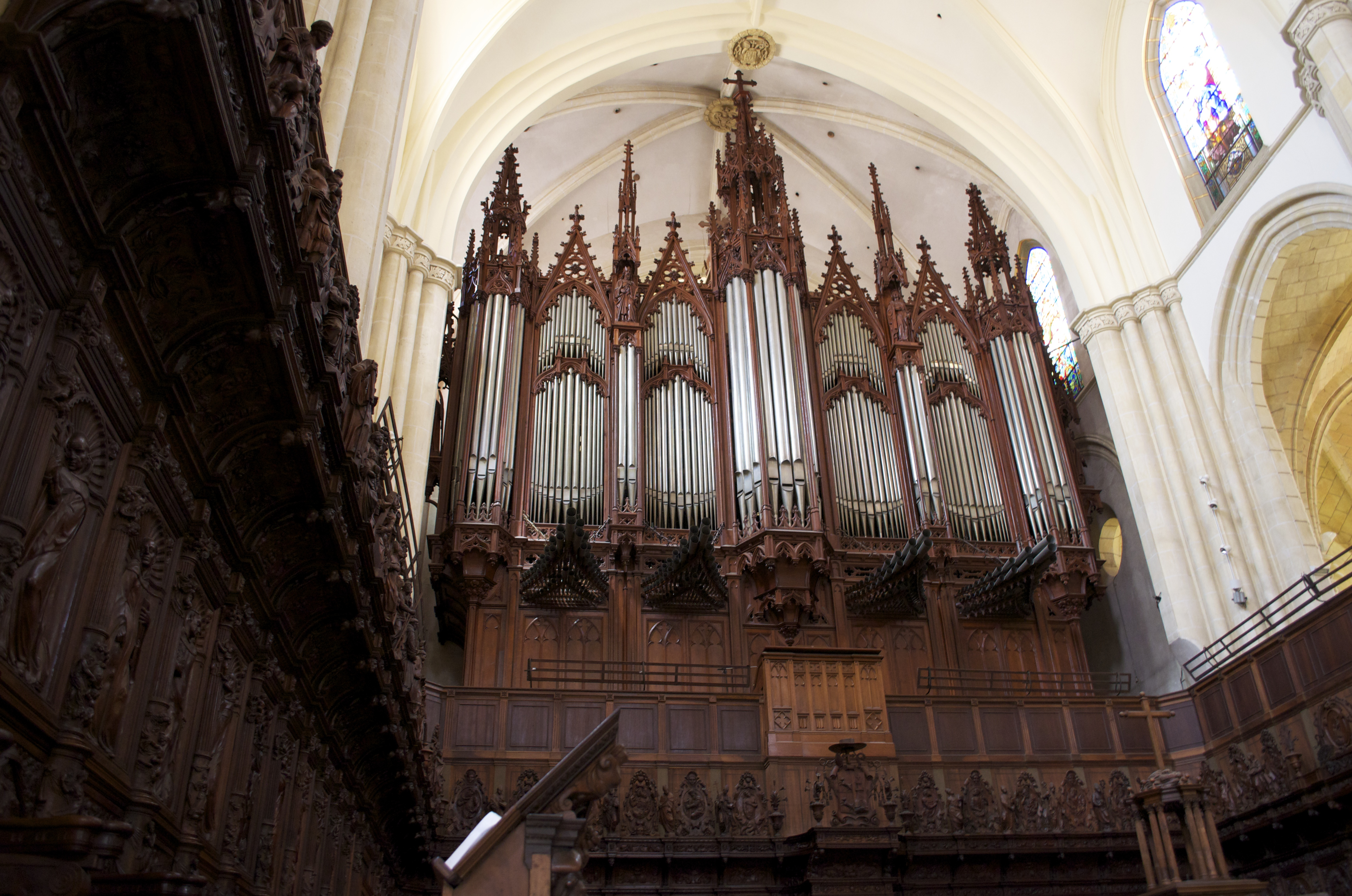 Órgano de la Catedral de Murcia